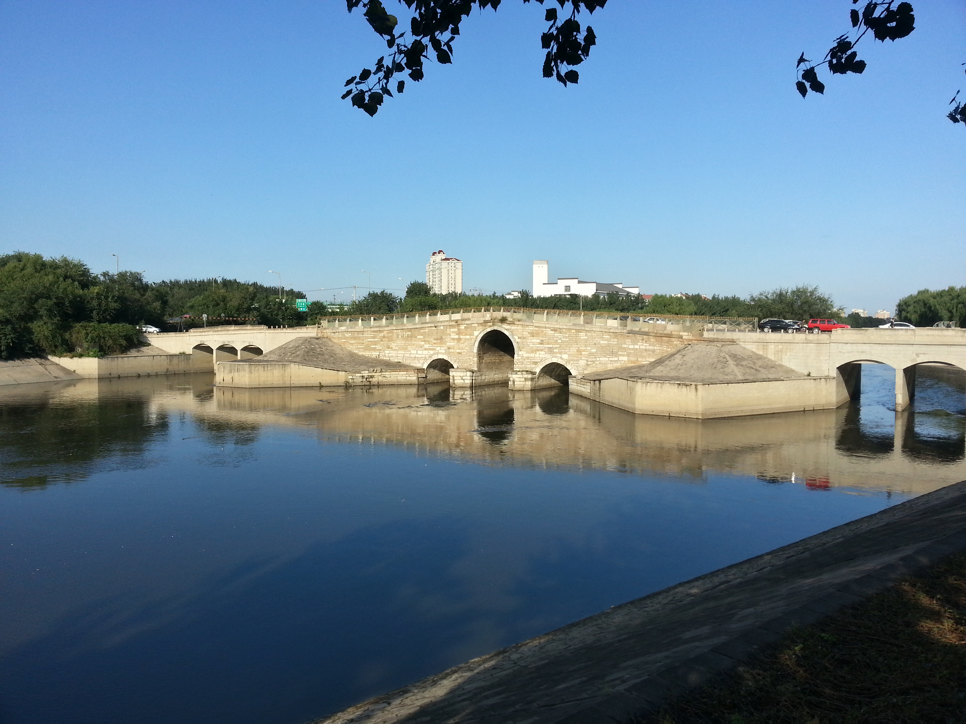 通惠河八里桥